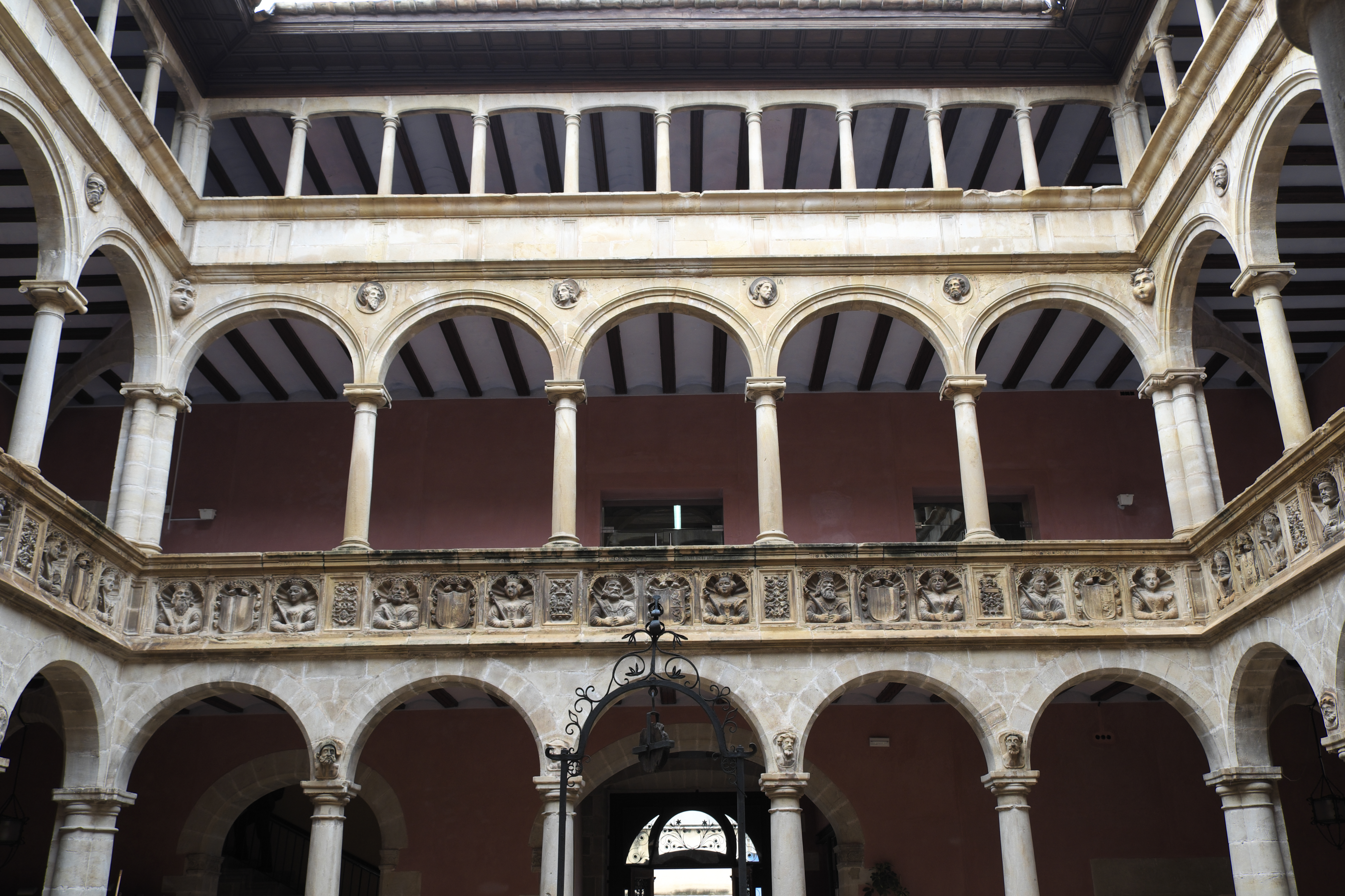 Colegio de San Jaime y San Matías in Tortosa in der Provinz Tarragona (Katalonien/Spanien), Innenhof